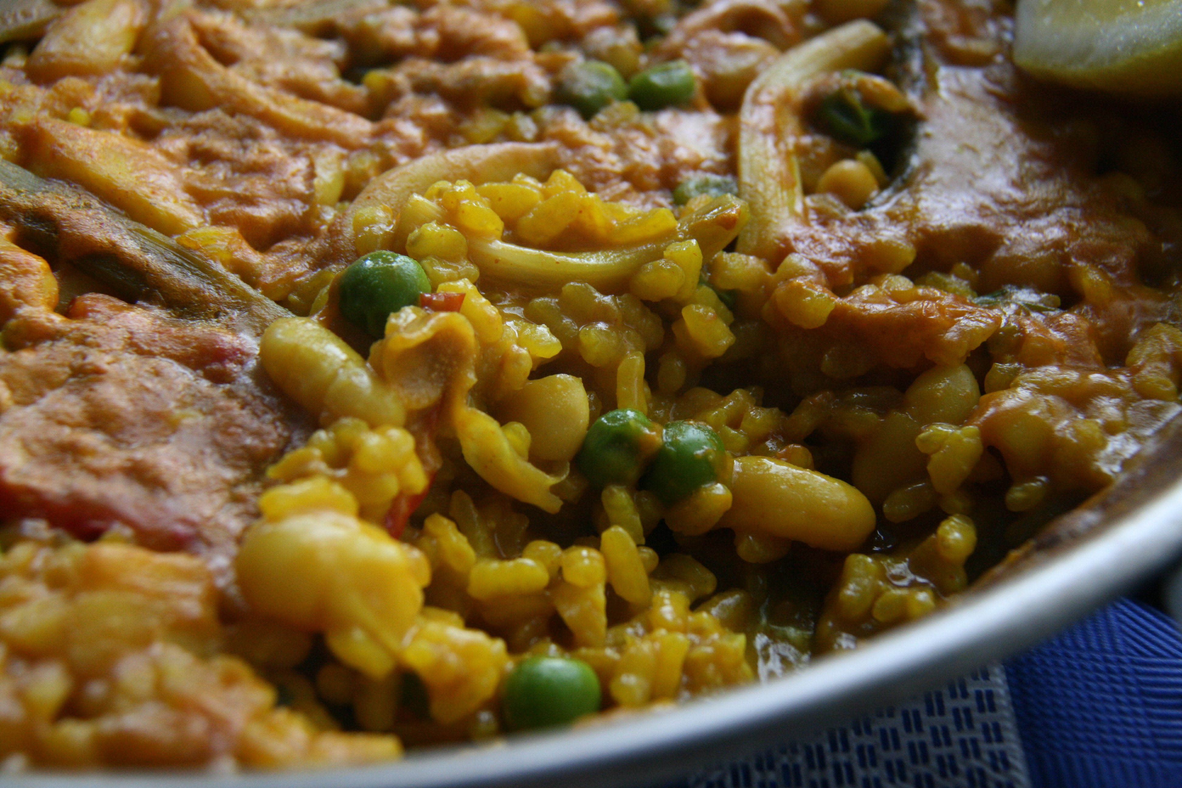 Arroz empedrado - „gespickter Reis“, hier mit Bohnen - Murcia